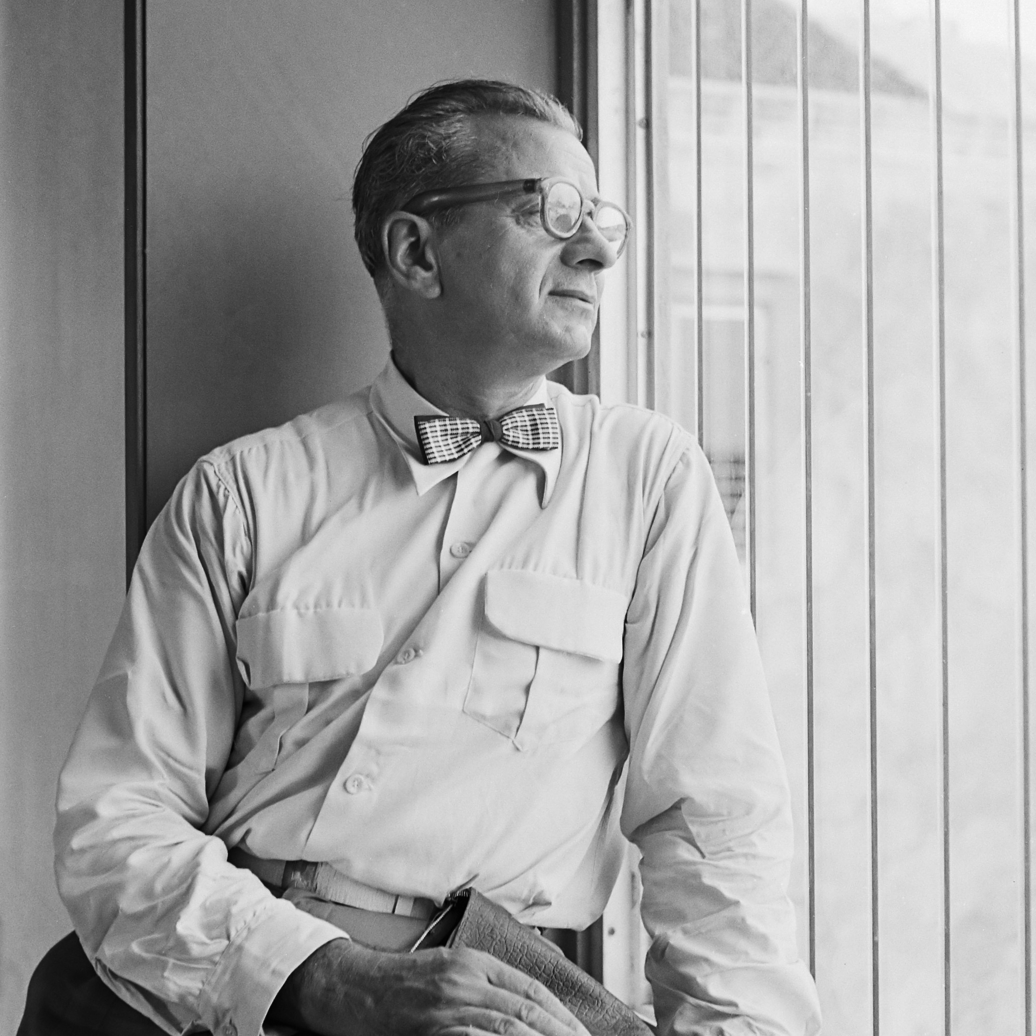 Charles Eyck en zijn werk 20 mei 1953